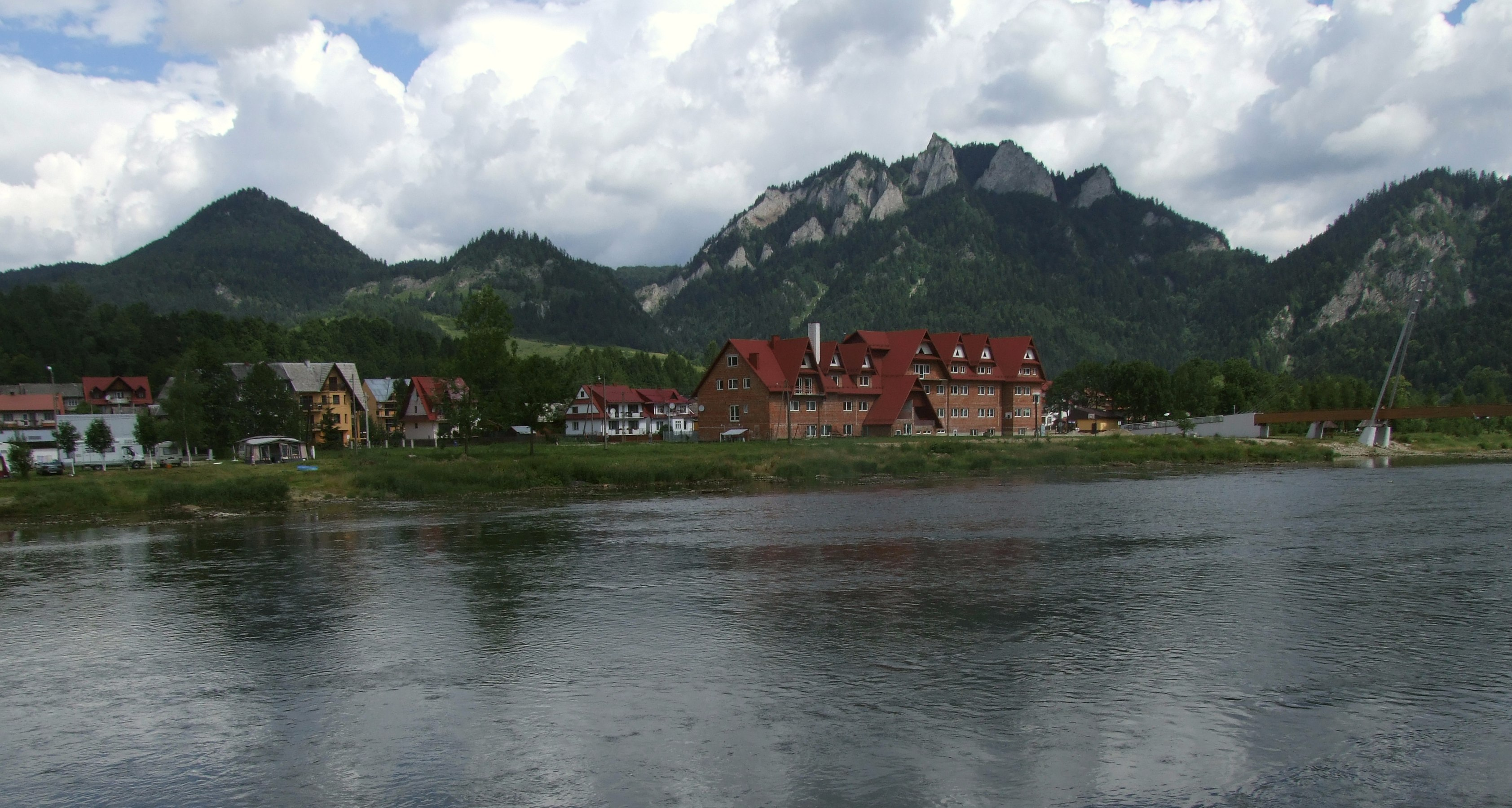 Pieniny - widok z Czerwonego Klasztoru